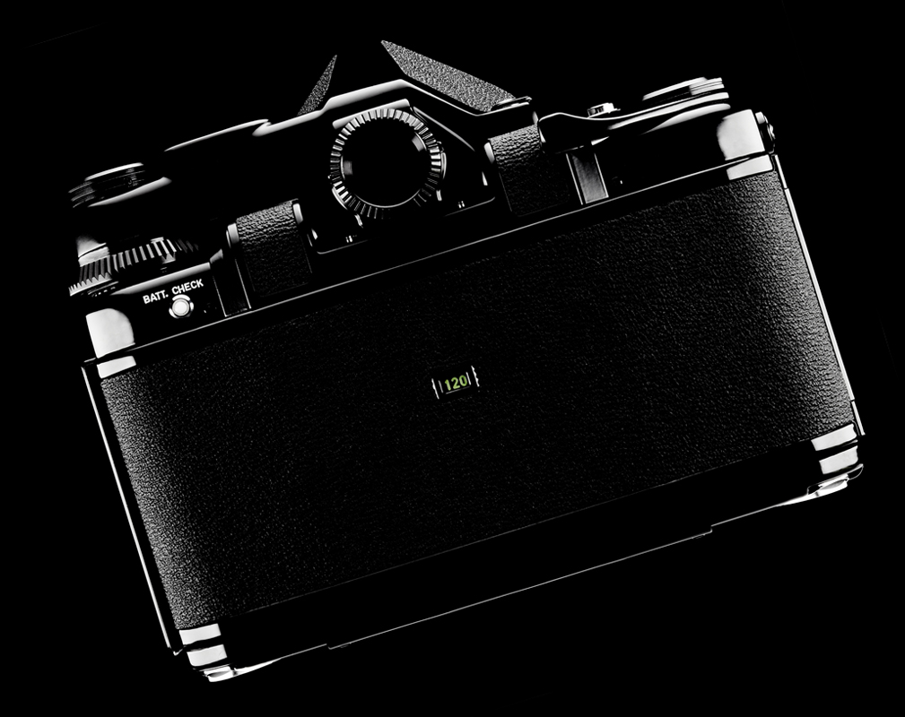 Pentax 6x7 Camera